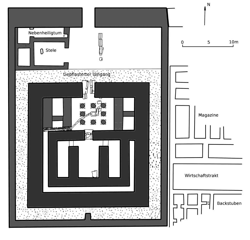 Ausgrabung des Österreichischen Archäologischen Instituts in Tell el-Dab'a / Auaris; Tempel bei 'Ezbet Rushdi, Areal R/I; Tempel für den Kult des Königs Amenemhet I.; vermutlich im 5. Regierungsjahr des Sesostris III. gegründet (Mittleres Reich); Plan nach einer Zeichnung von M.-A. Negrete in M. Bietak, J. Dorner: Der Tempel und die Siedlung des Mittleren Reiches bei 'Ezbet Rushdi. Grabungsvorbericht 1996. In: Ägypten und Levante VIII, 1998, S. 15, Fig. 4.